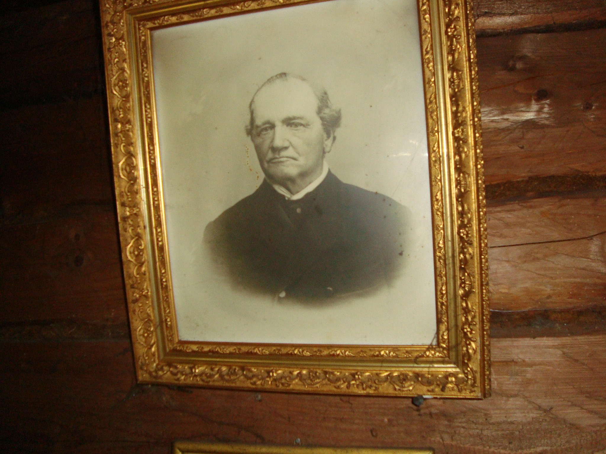 Der estnische Bauer, Lehrer und Kaufmann Juri Lellep (1841 oder 1842 - 1908).